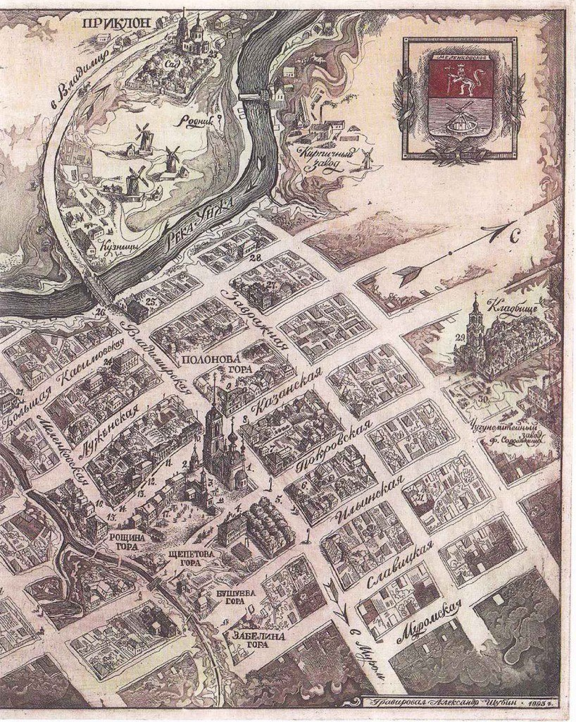 город Меленки, гравюра Александра Шубина, 1895 год